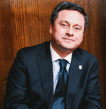 Álvaro Ortiz y Michelle Bachelet en Concepción.